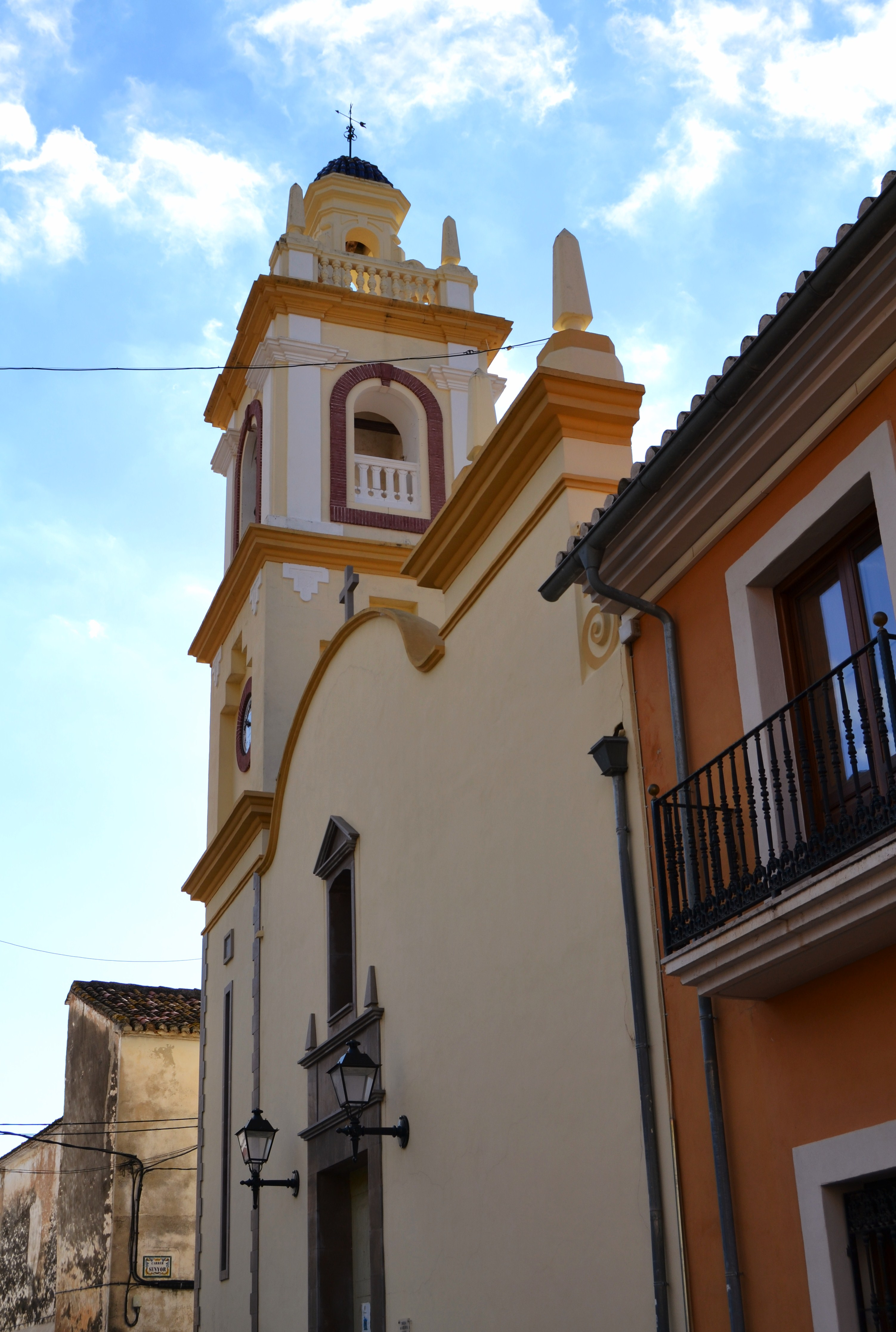 Església de Sant Andreu de Benimeli.